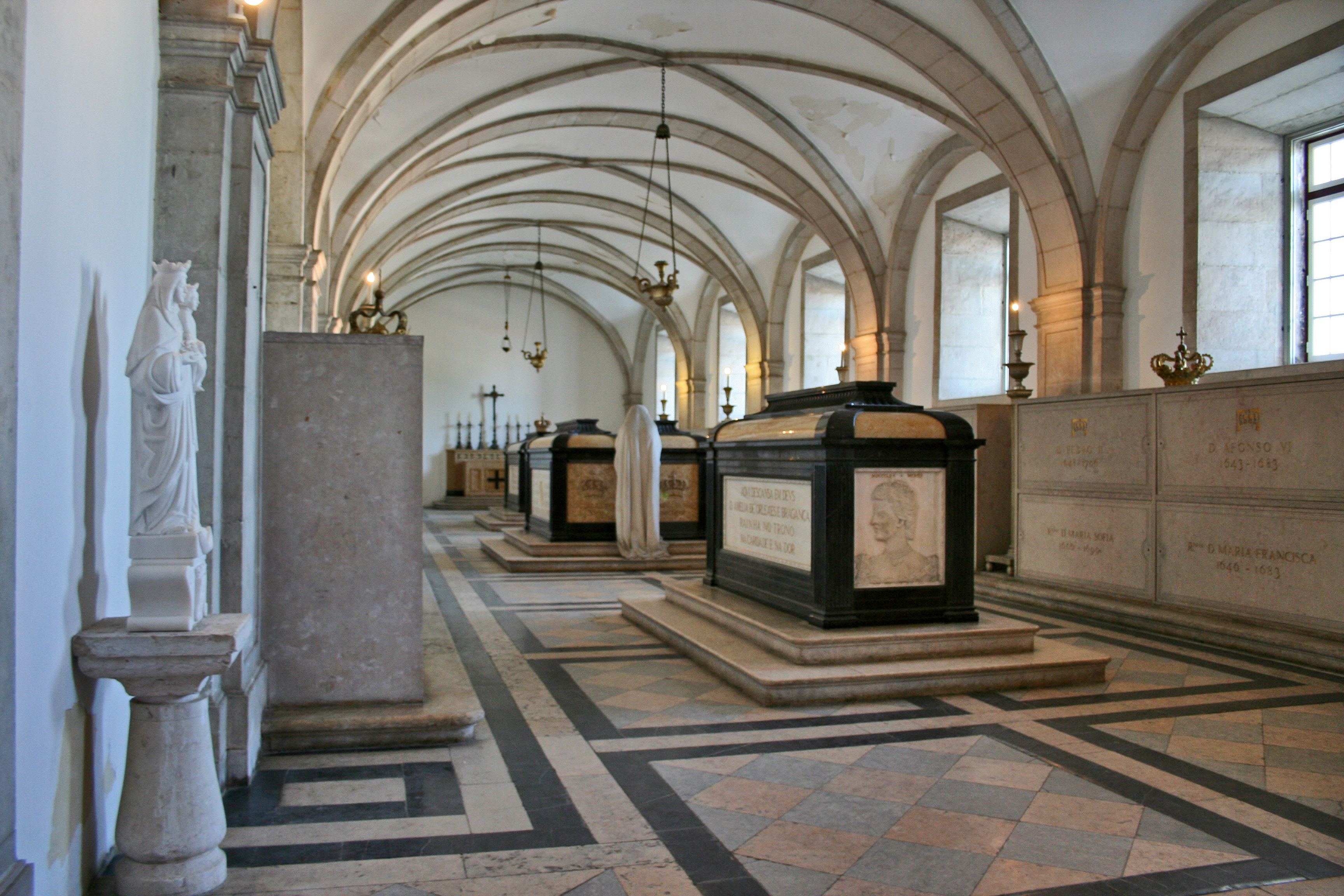 Mosteiro de São Vicente de Fora This file was uploaded for Wiki Loves Monuments in Portugal with the unique identifier 71213.